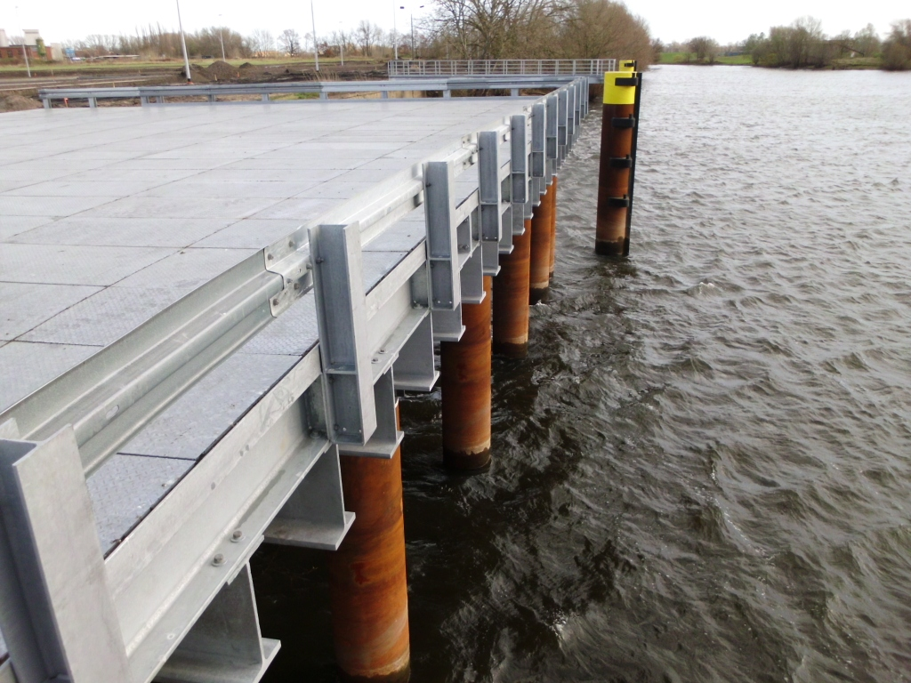 Neuer Anleger für Container, Stückgut und Projektladung in Wittenberge